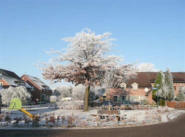 Stukjes van de Randweg en Zandseveldweg te Sint Anthonis, in de wijk "'t Zandseveld". De open structuur van de wijk is goed te zien.